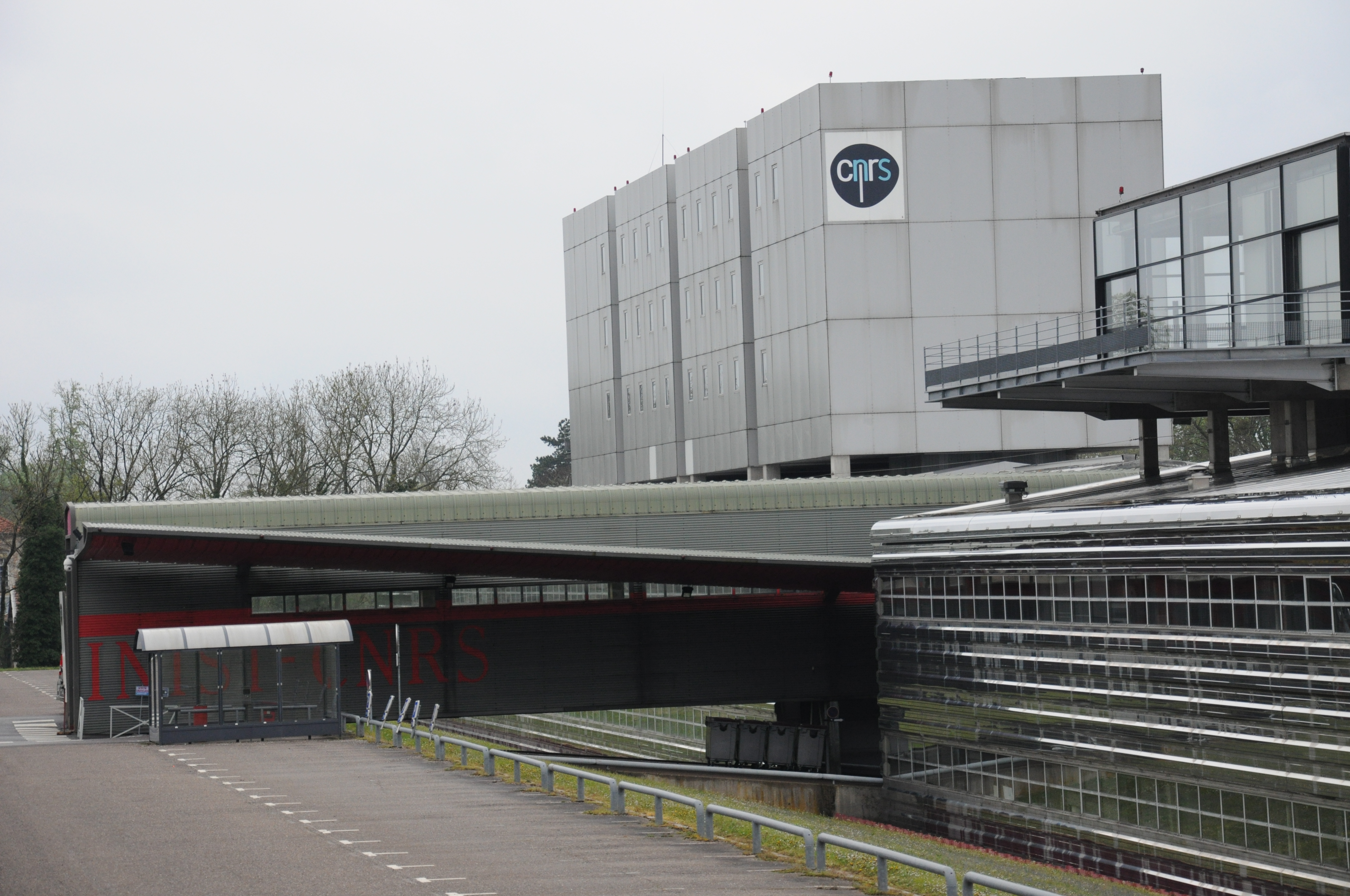 Bâtiment de l'Institut de l'Information Scientifique et technique